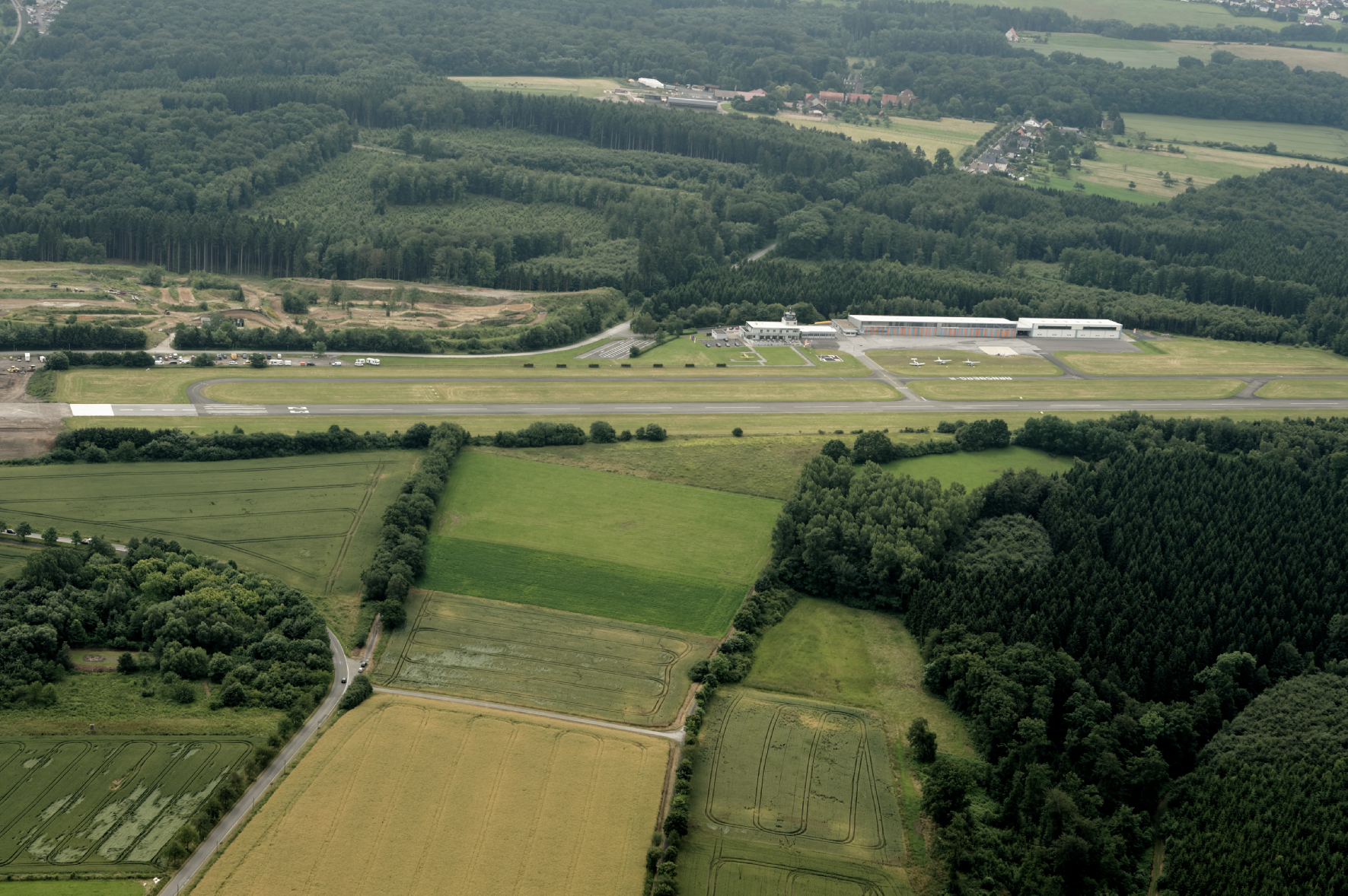 Flugplatz Arnsberg-Menden (genannt Flugplatz Echthausen auf dem Gebiet von Arnsberg-Voßwinkel) (Fotoflug Sauerland Nord) The making of this document was supported by the Community-Budget of Wikimedia Germany.